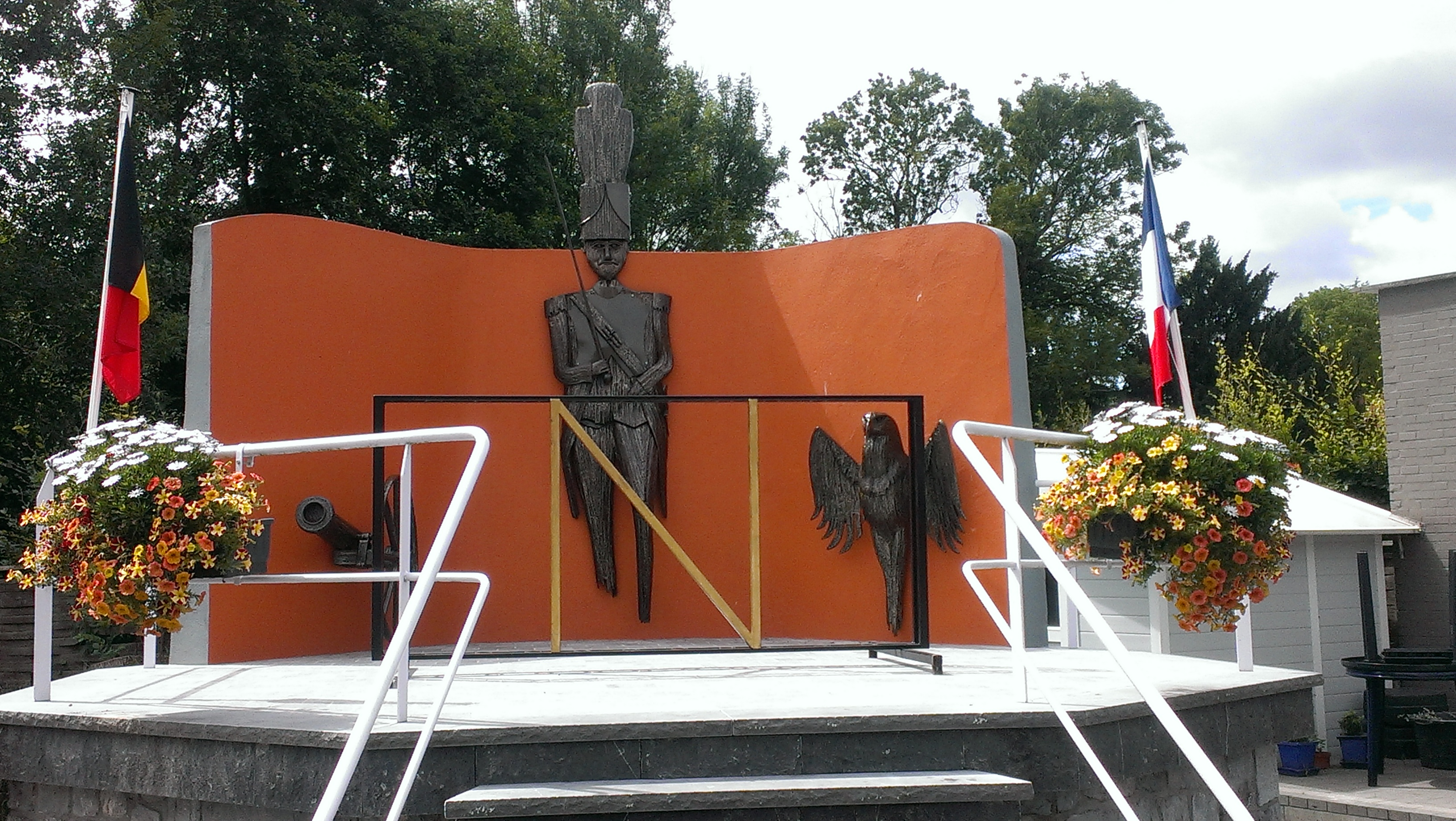 Monument in Silenrieux, ter ere van de Marches de l'Entre-Sambre-et-Meuse, in juli 2017.